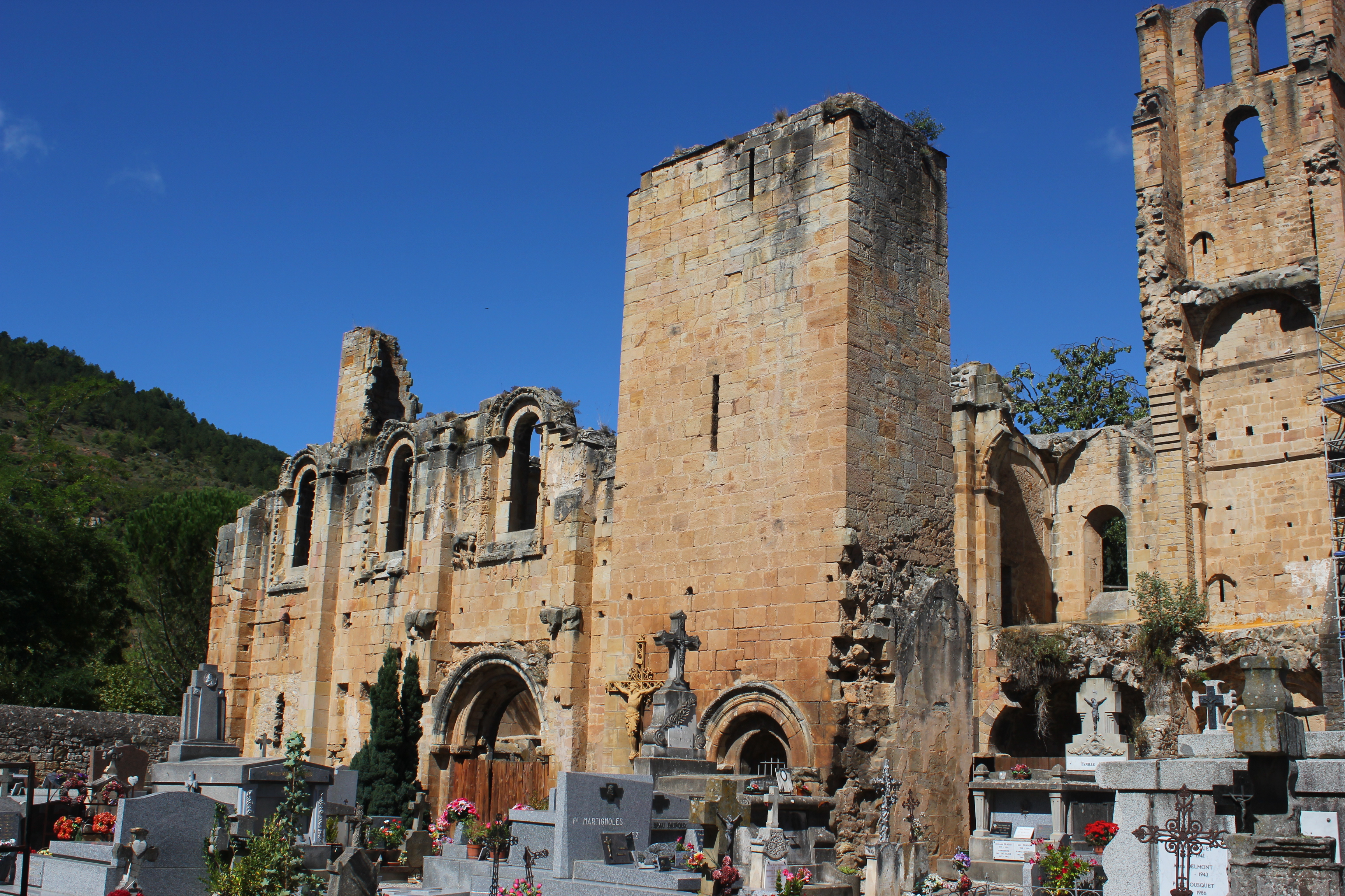 Abbaye d'Alet les bains (11)France